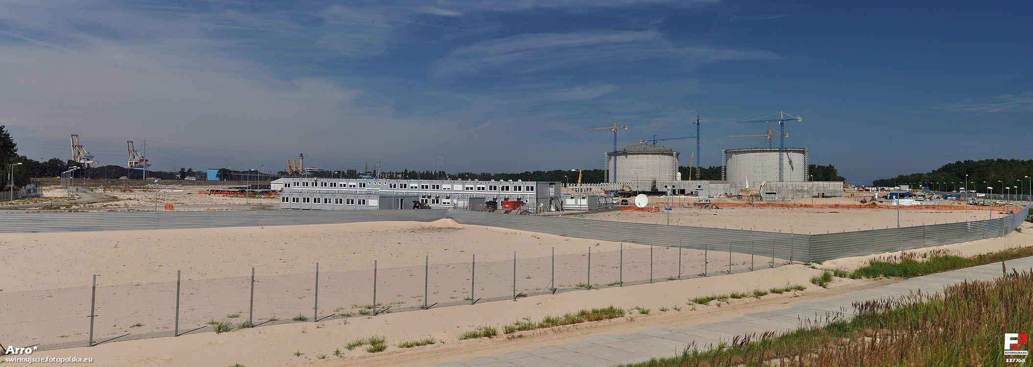 Teren budowy części lądowej terminalu regazyfikacyjnego skroplonego gazu ziemnego. Daleko w tle widoczna latarnia morska.